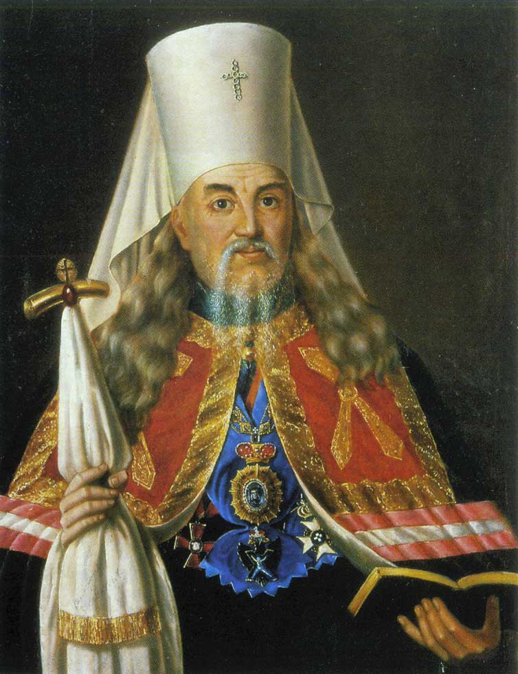 Серапион (Александровский)